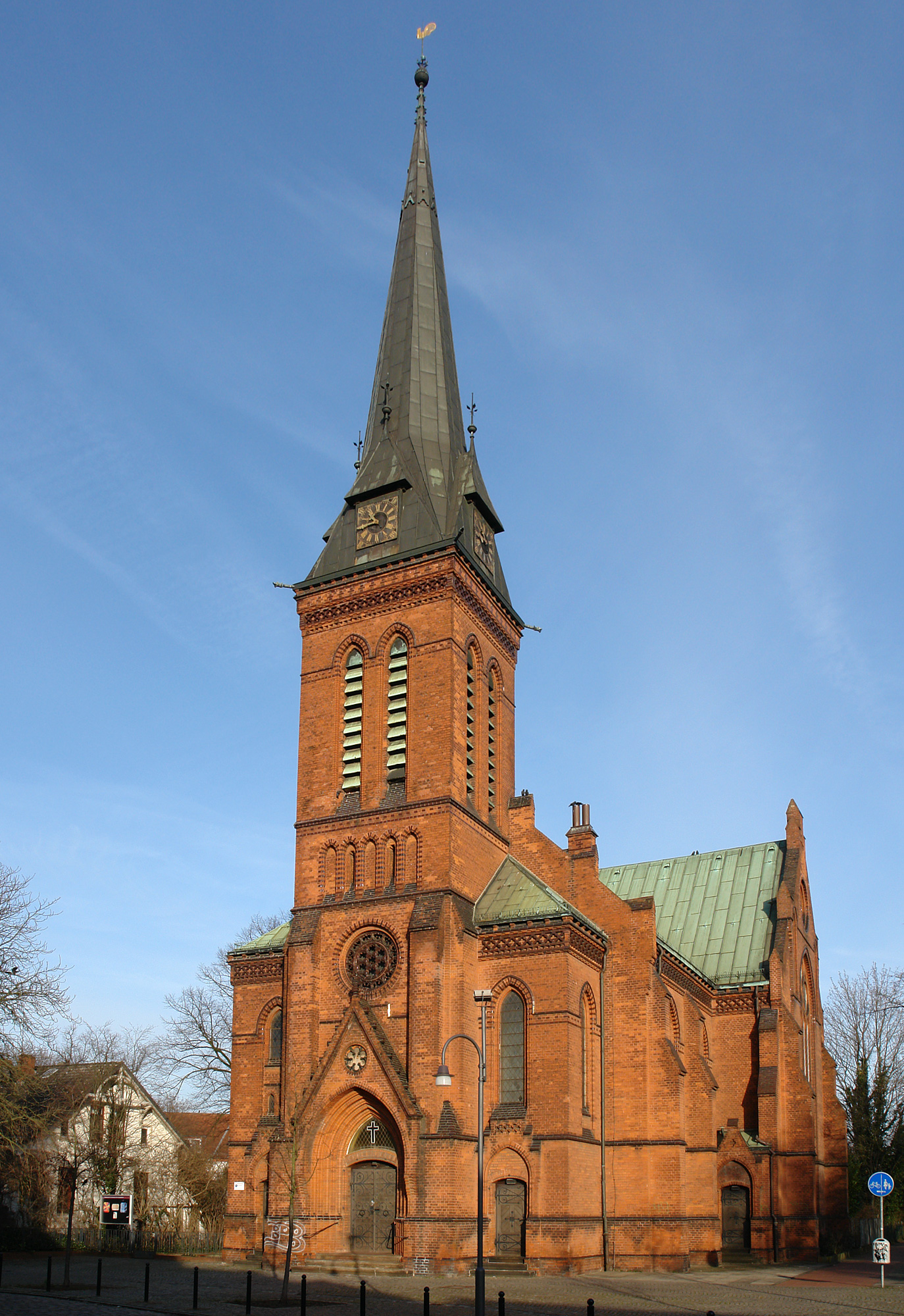 Ev. Kirche Hemelingen in Bremen, Westerholzstraße 19. Das abgebildete Objekt ist ein geschütztes Kulturdenkmal in der Freien Hansestadt Bremen, mit der Nr. 1223 beim Landesamt für Denkmalpflege registriert.